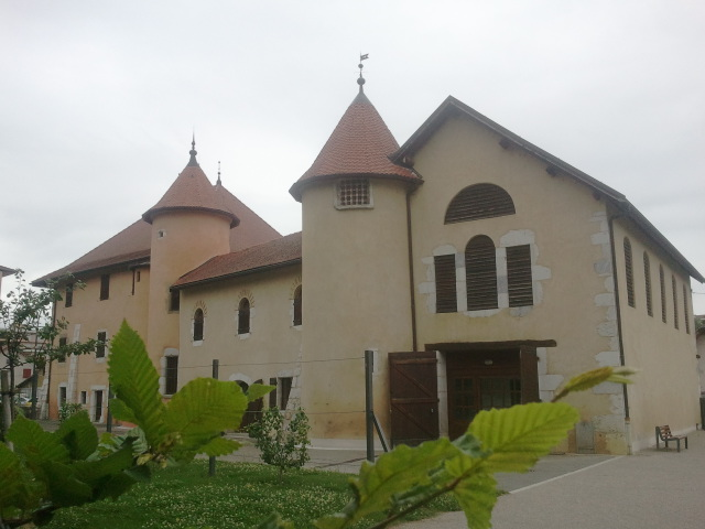 Manoir de Novel